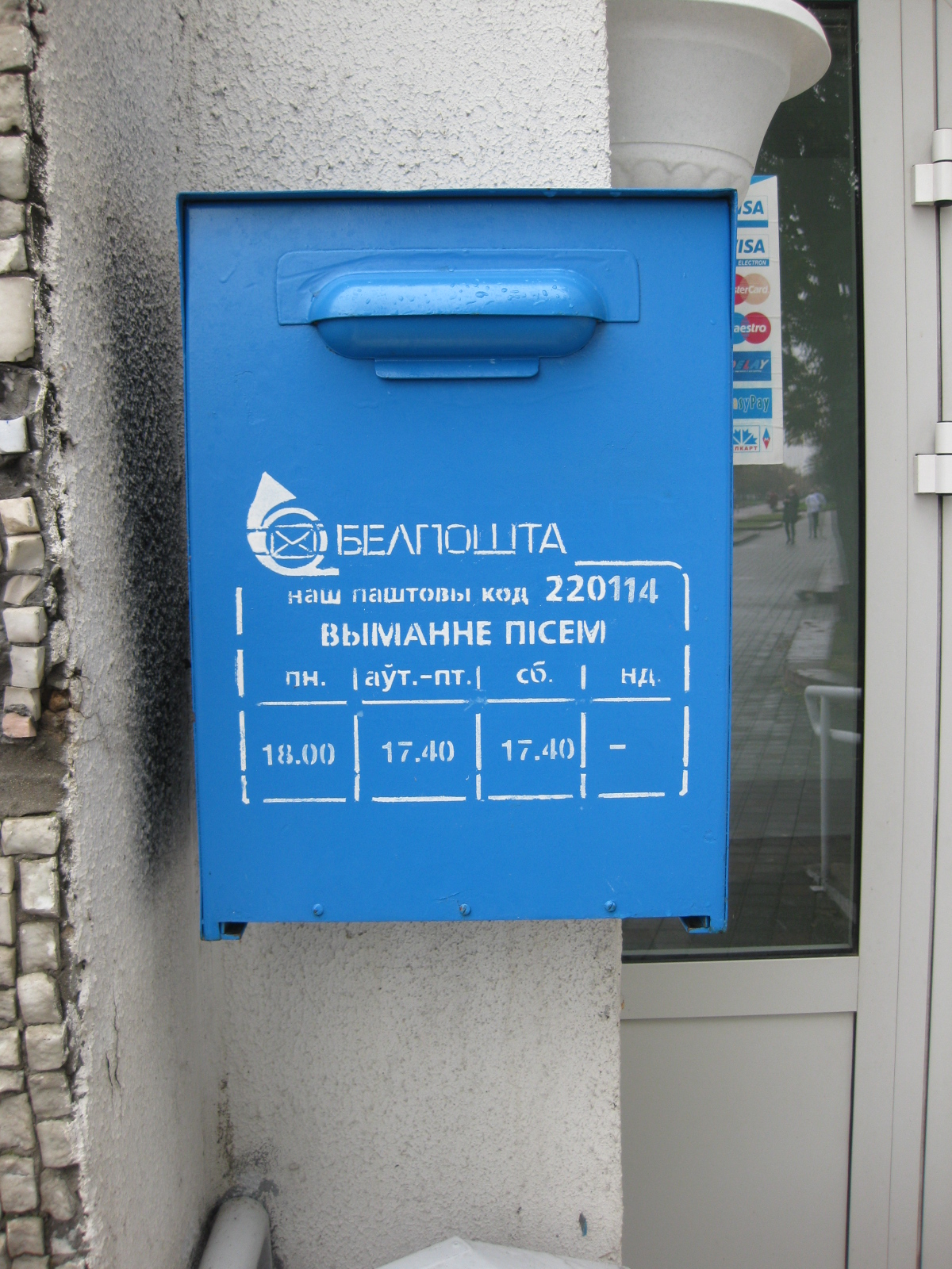 Почтовый ящик на углу почтового отделения. Минск, Беларусь